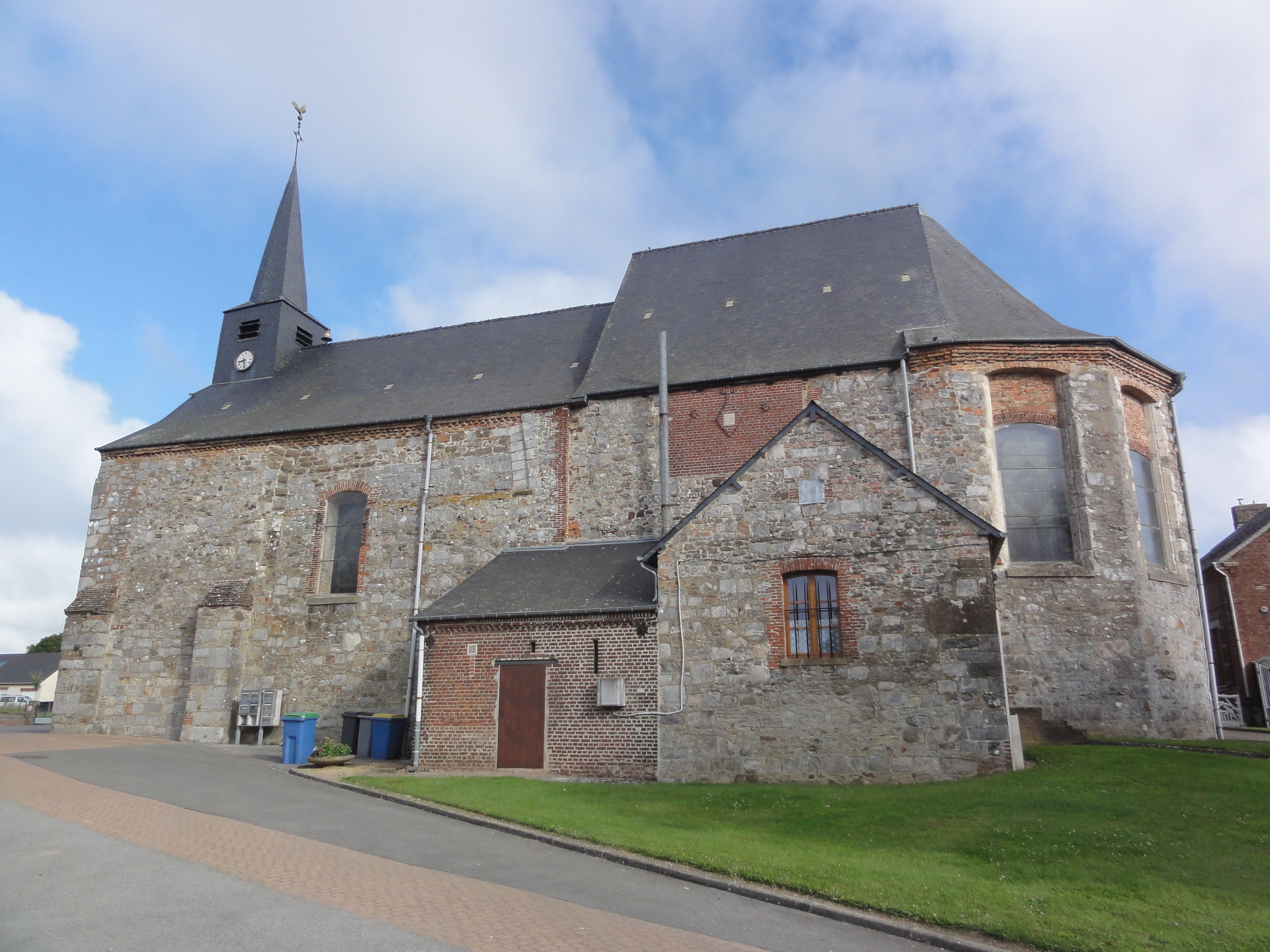 Clairfontaine (Aisne) église